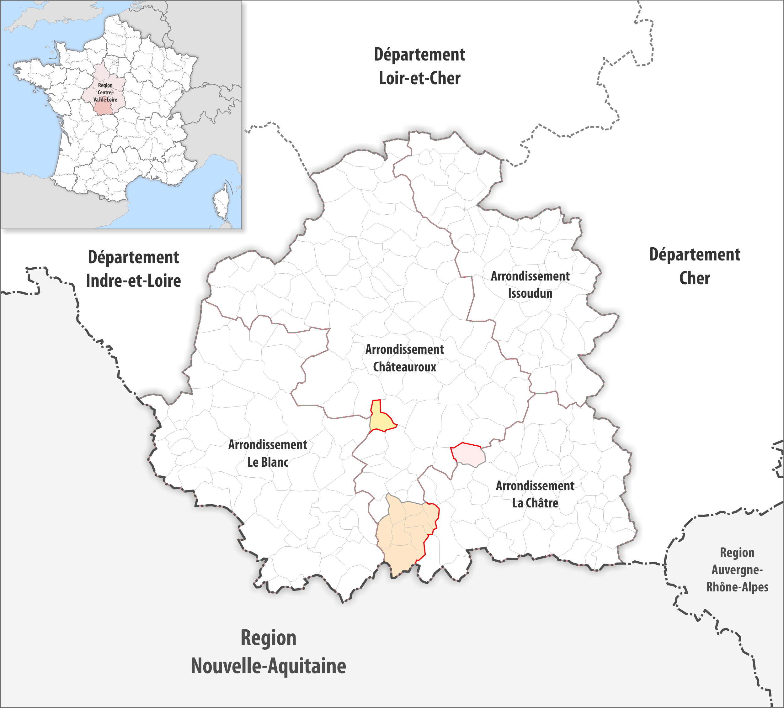 Arrondissements Anpassungen auf 2017 im Departement Indre